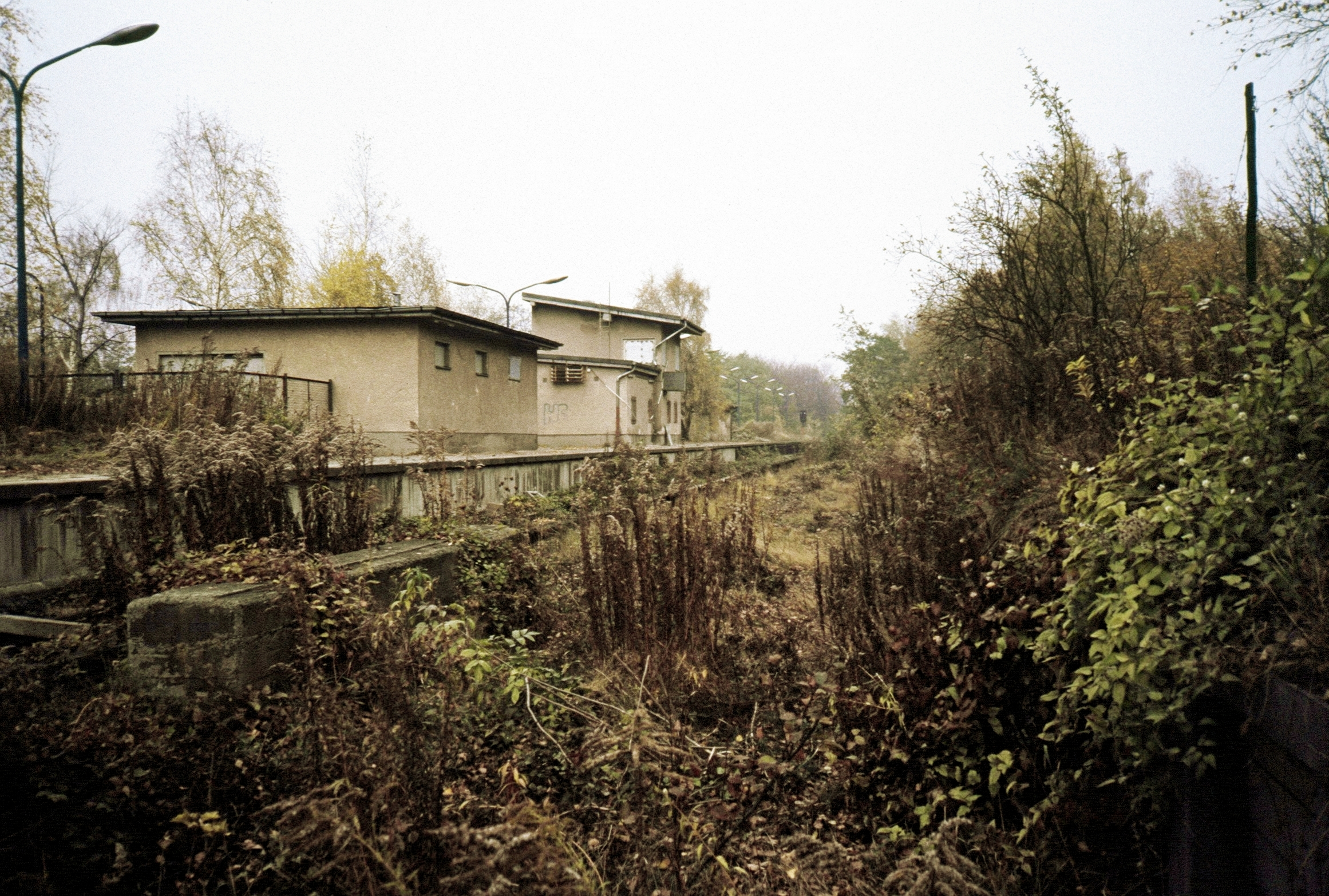 Stillgelegter Bahnhof Berlin Lichterfelde Süd